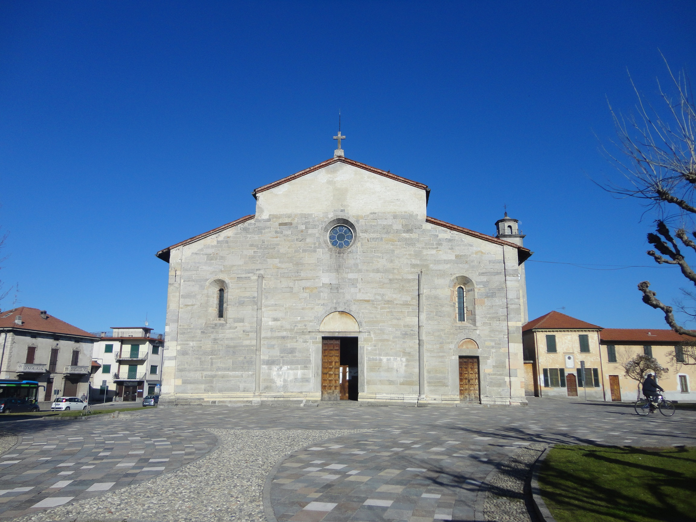 Facciata della chiesa romanica dei Santi Pietro e Paolo a Brebbia